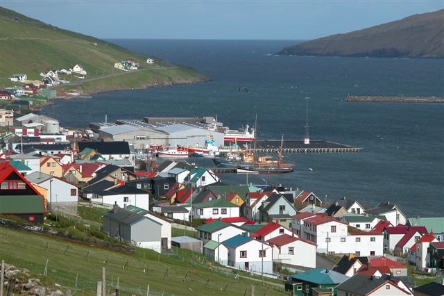 Vágur, Suðuroy, Faroe Islands